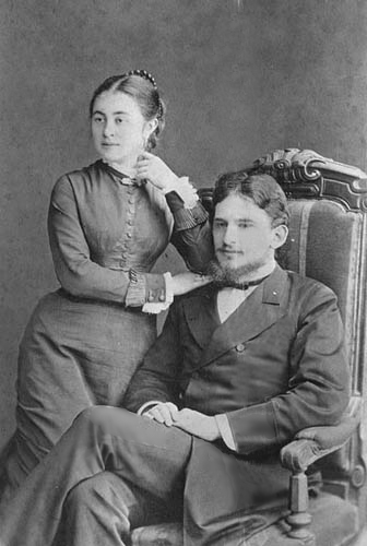 Купец Григорий Александрович Крестовников (1855—1918) с женой Юлией Тимофеевной, урожденной Морозовой (1858—1920)